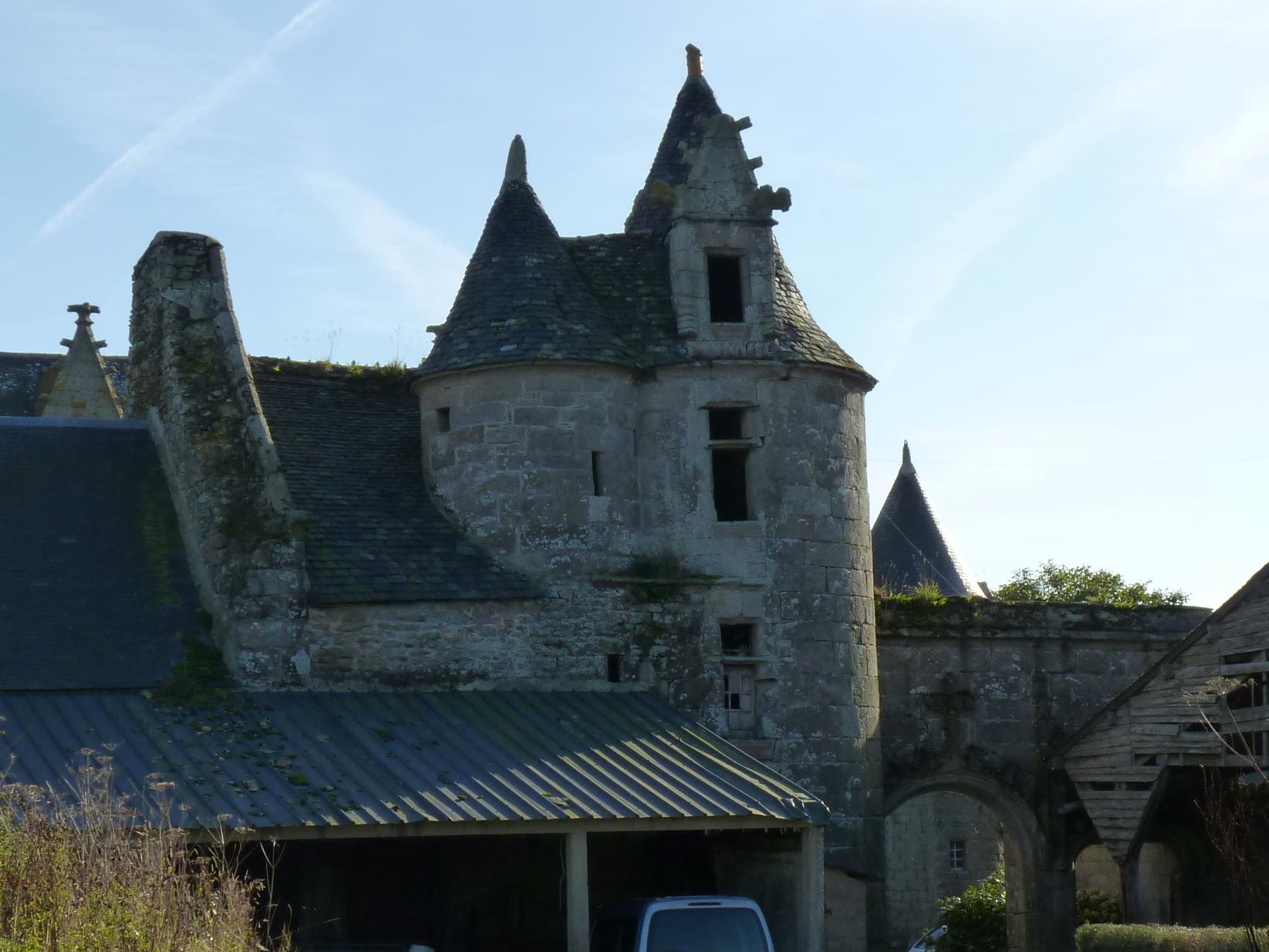 Château du 15ème siècle transformé en ferme